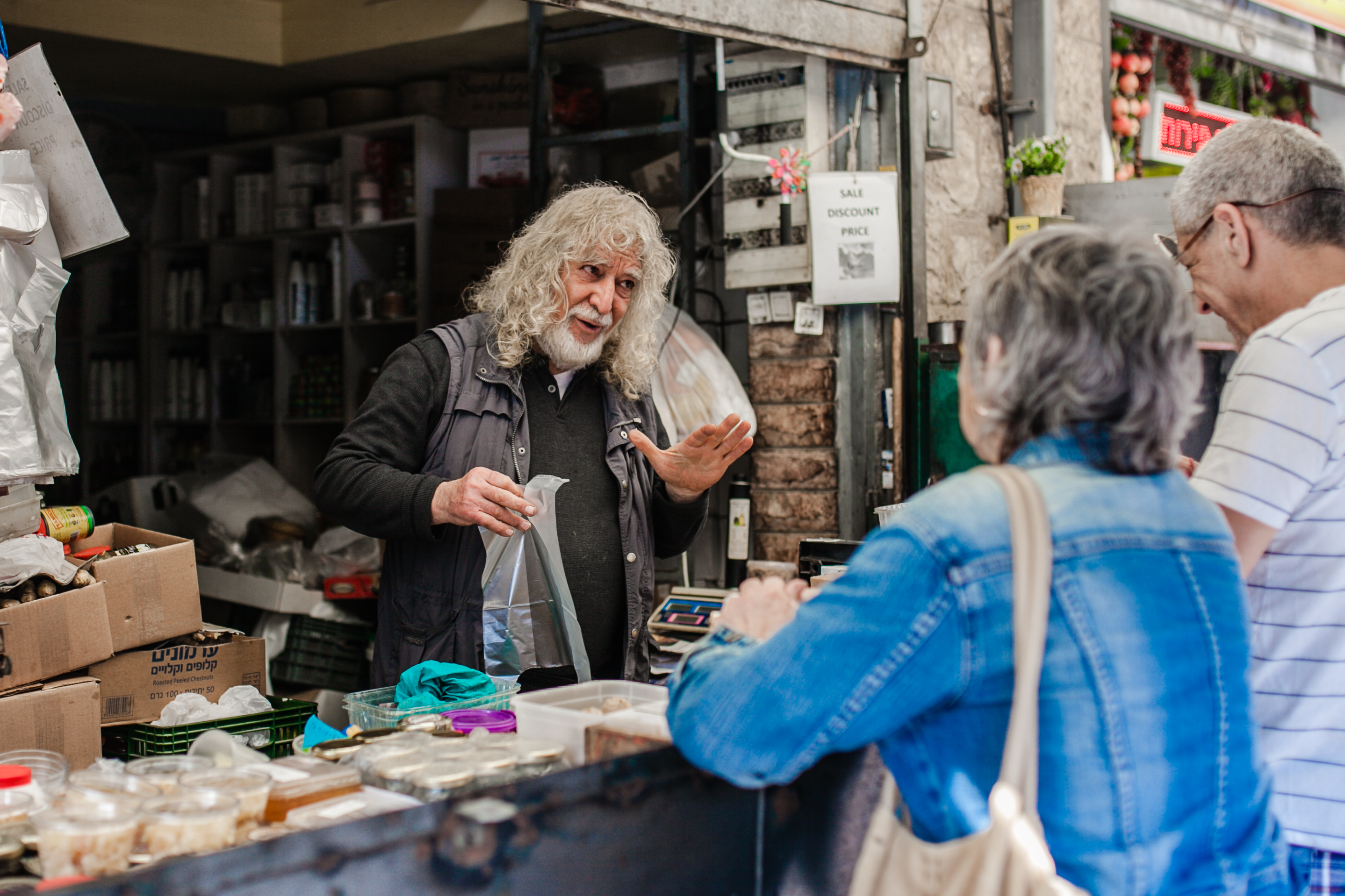 Продавец на рынке